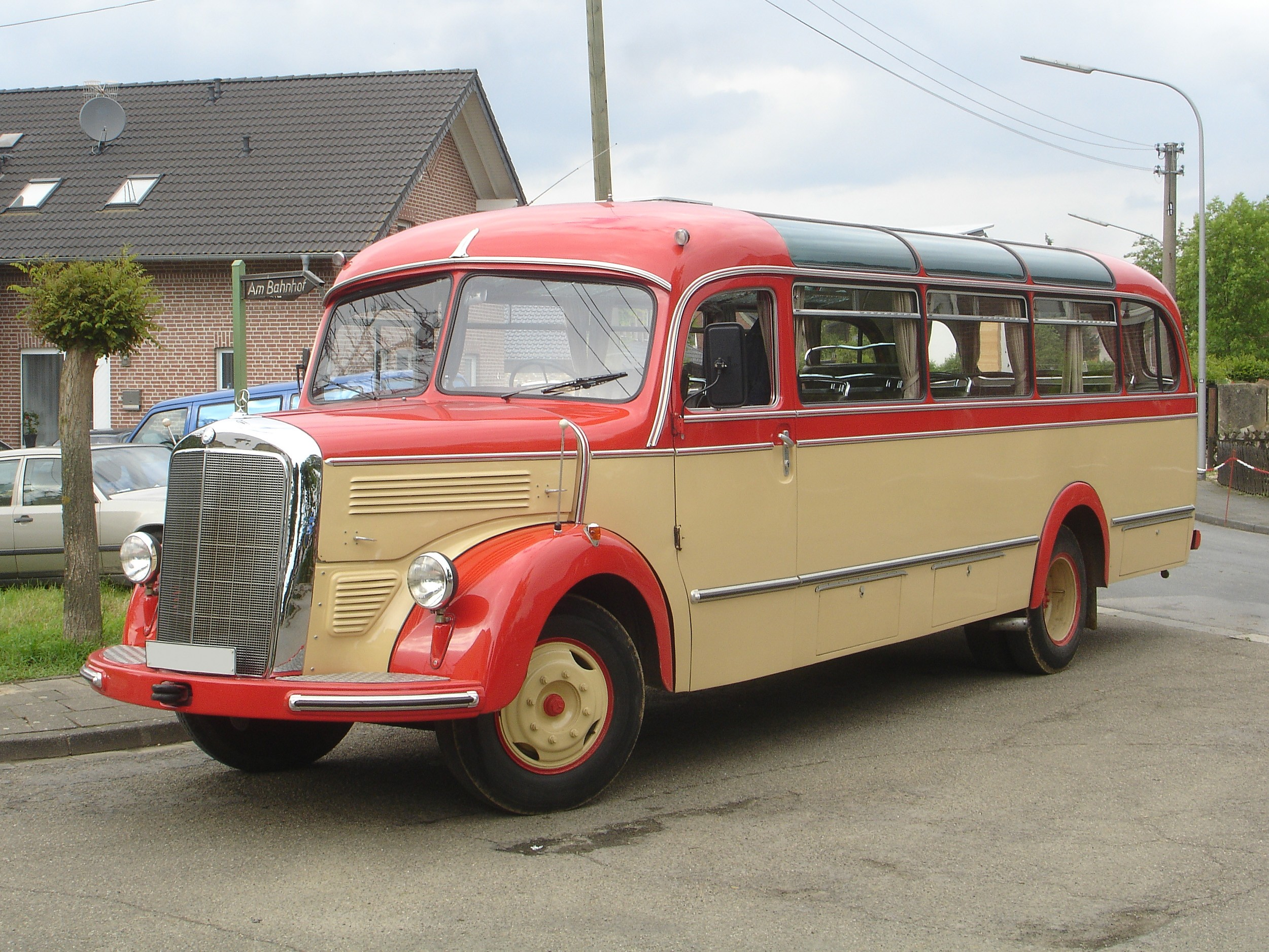 Mercedes O 3500 Reisebus von 1953 mit Dachrandverglasung